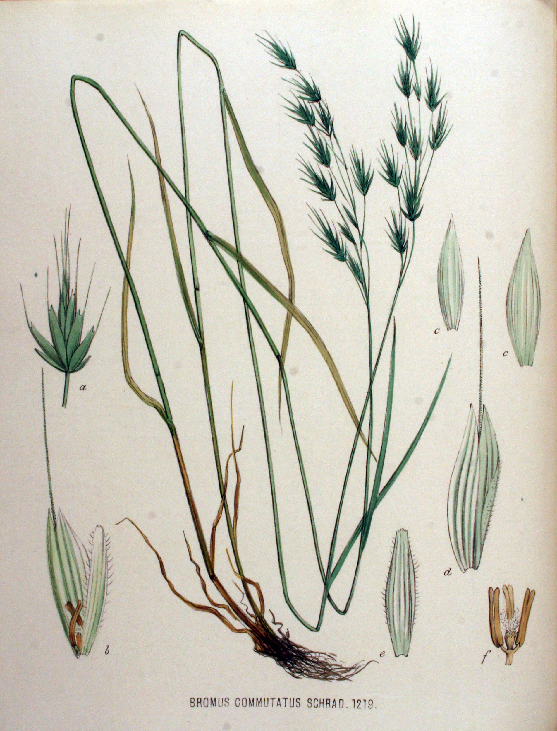 Bromus commutatusSchrad.